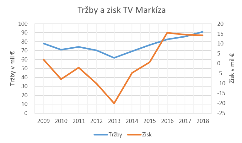 Trzby a zisk TV Markiza 2018 podľa Finstat